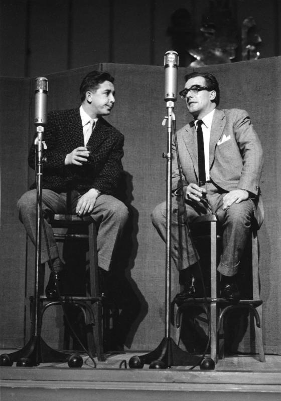 Gastspiel in Düsseldorf, 19.10.1956 Kabarett "Die Stachelschweine" Berlin Szene: Menschen wie Du und Sie Text: Thierry